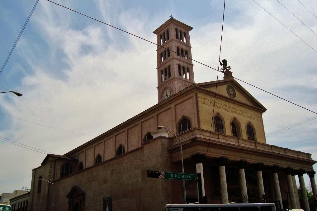 By Catedrales e Iglesias Album 0630 Álbum 0630 Arquidióceis de Monterrey LA CORONACION DE LA VIRGEN DEL ROBLE 25 de Diciembre # 499 Apdo. Postal 46450 Fracc. El Roble S. Nicolás de los Garza, N.L. 66450 Tel/Fax 352-49-87